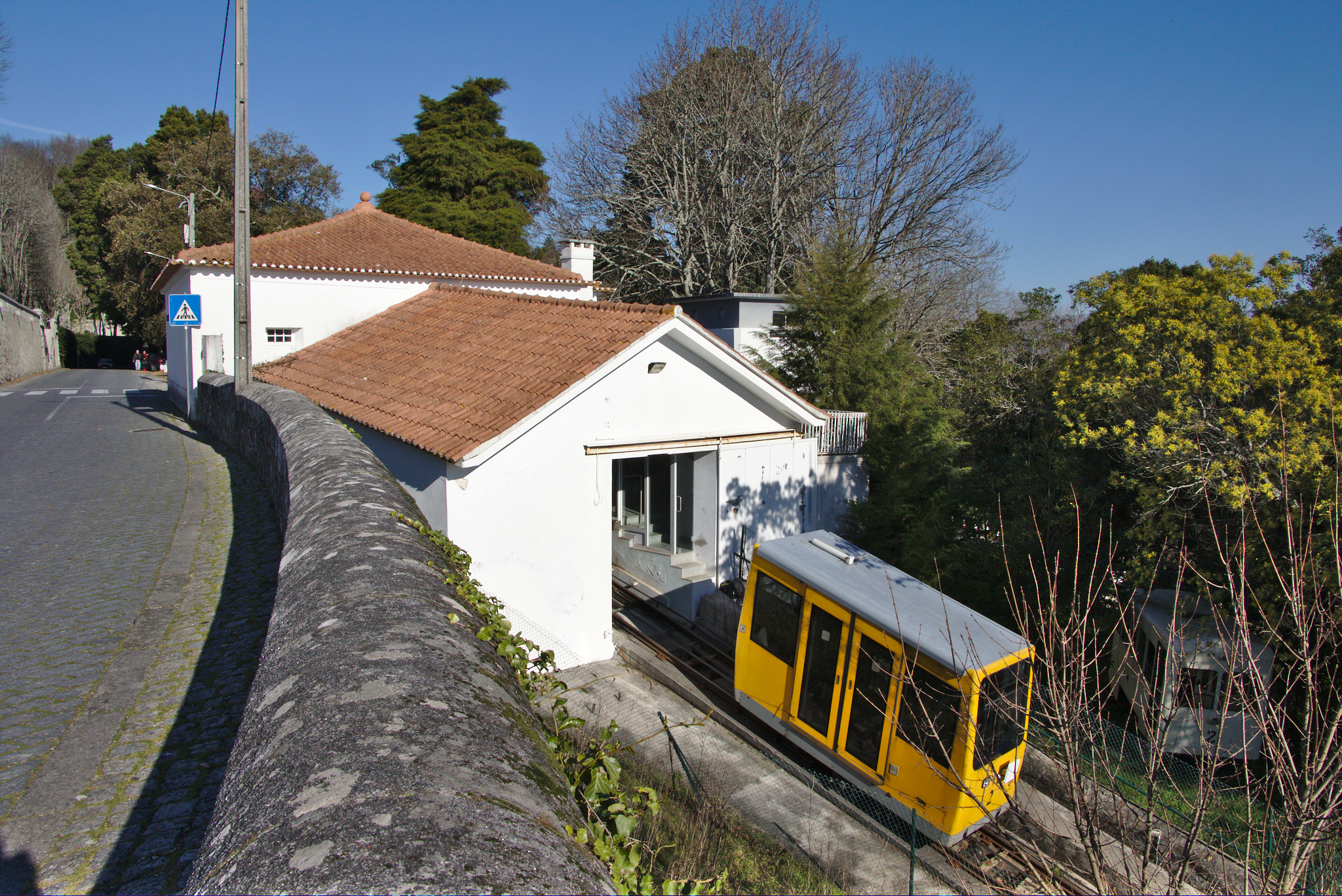 Plano inclinadolocalizado no Monte de Santa Luzia, em Viana do Castelo. É um funicular que liga a Estação Ferroviária de Viana do Castelo ao Santuário de Santa Luzia, no cimo do monte do mesmo nome.